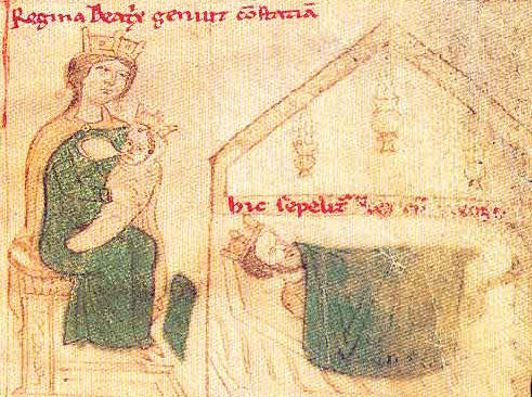 Betarix z Rethelu s dcerou Konstancií a umírajícím Rogerem II. Sicilským